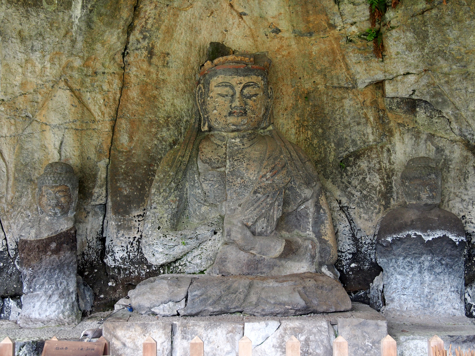 臼杵磨崖仏古園石仏群大日如来像（大分県臼杵市）